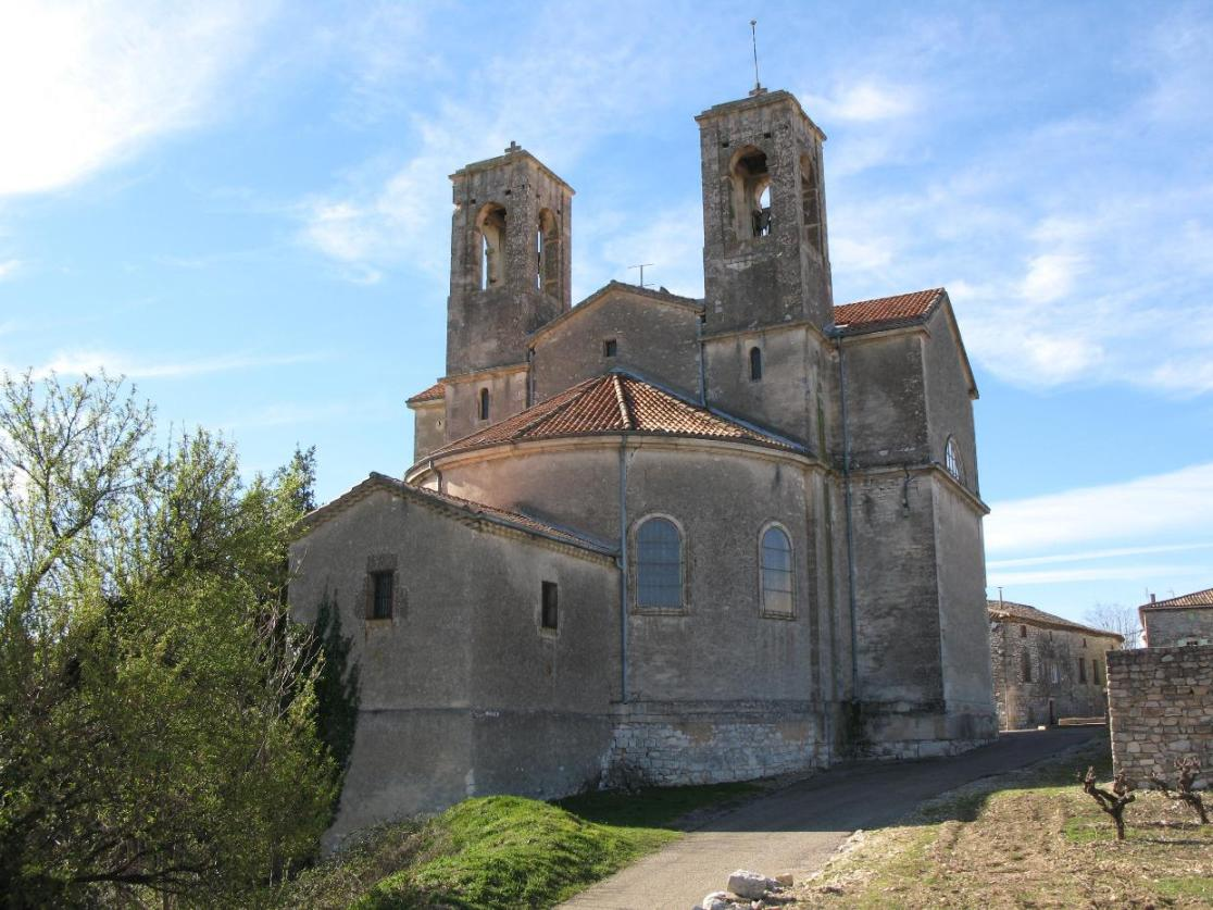 Village de Orgnac-l'Aven (Ardèche)